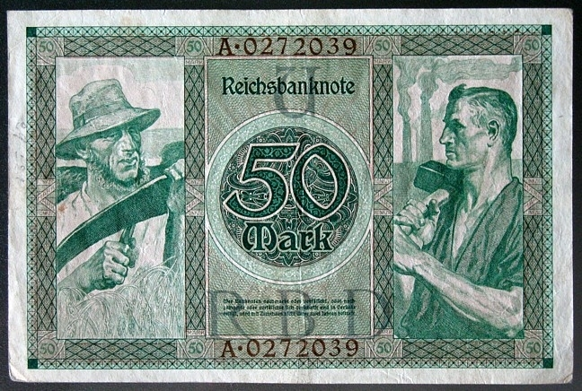 Banknote - 50 Mark - Deutsches Reich - 23.07.1920